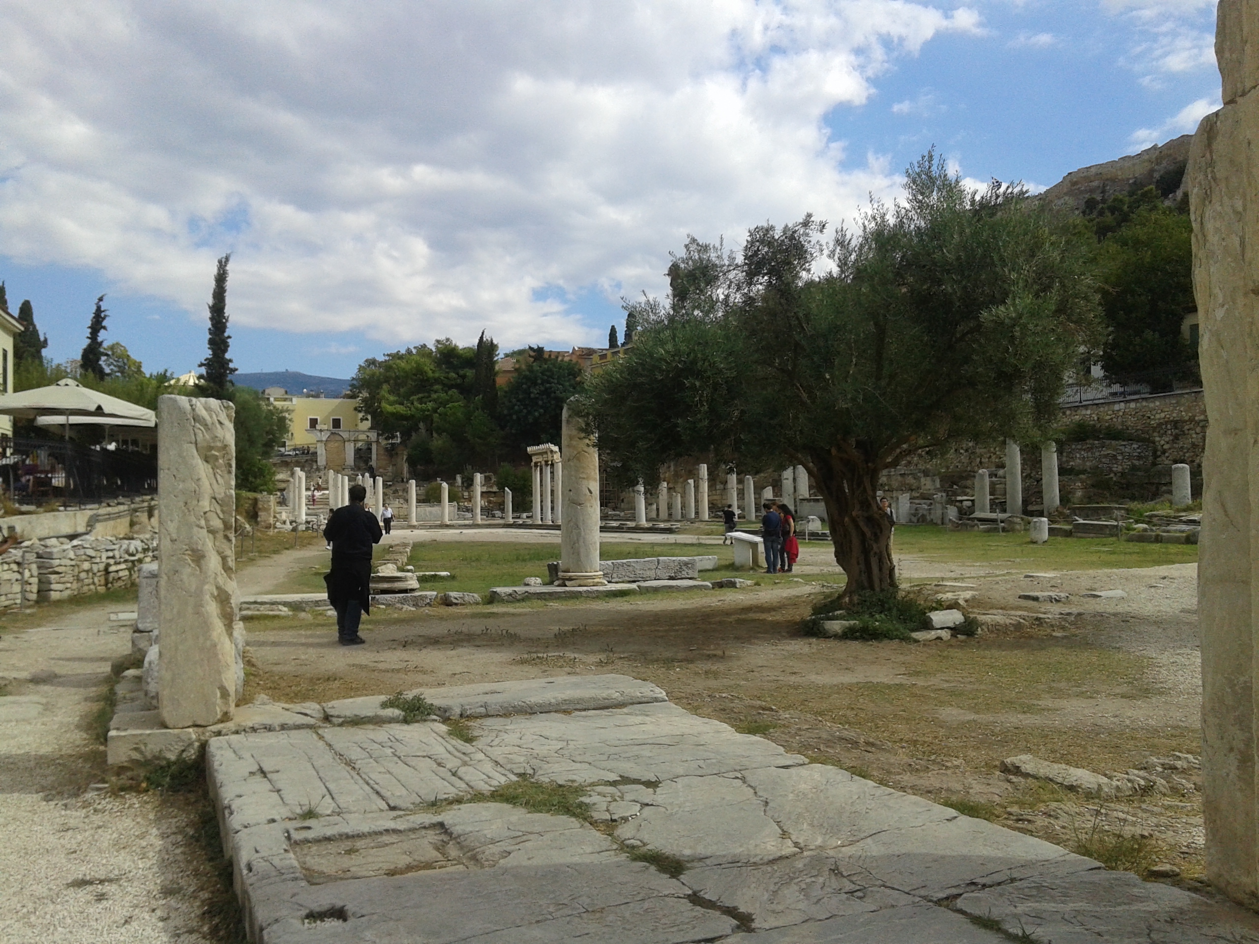 Ρωμαϊκή Αγορά Αθηνών«Ρωμαϊκή Αγορά της Αθήνας»